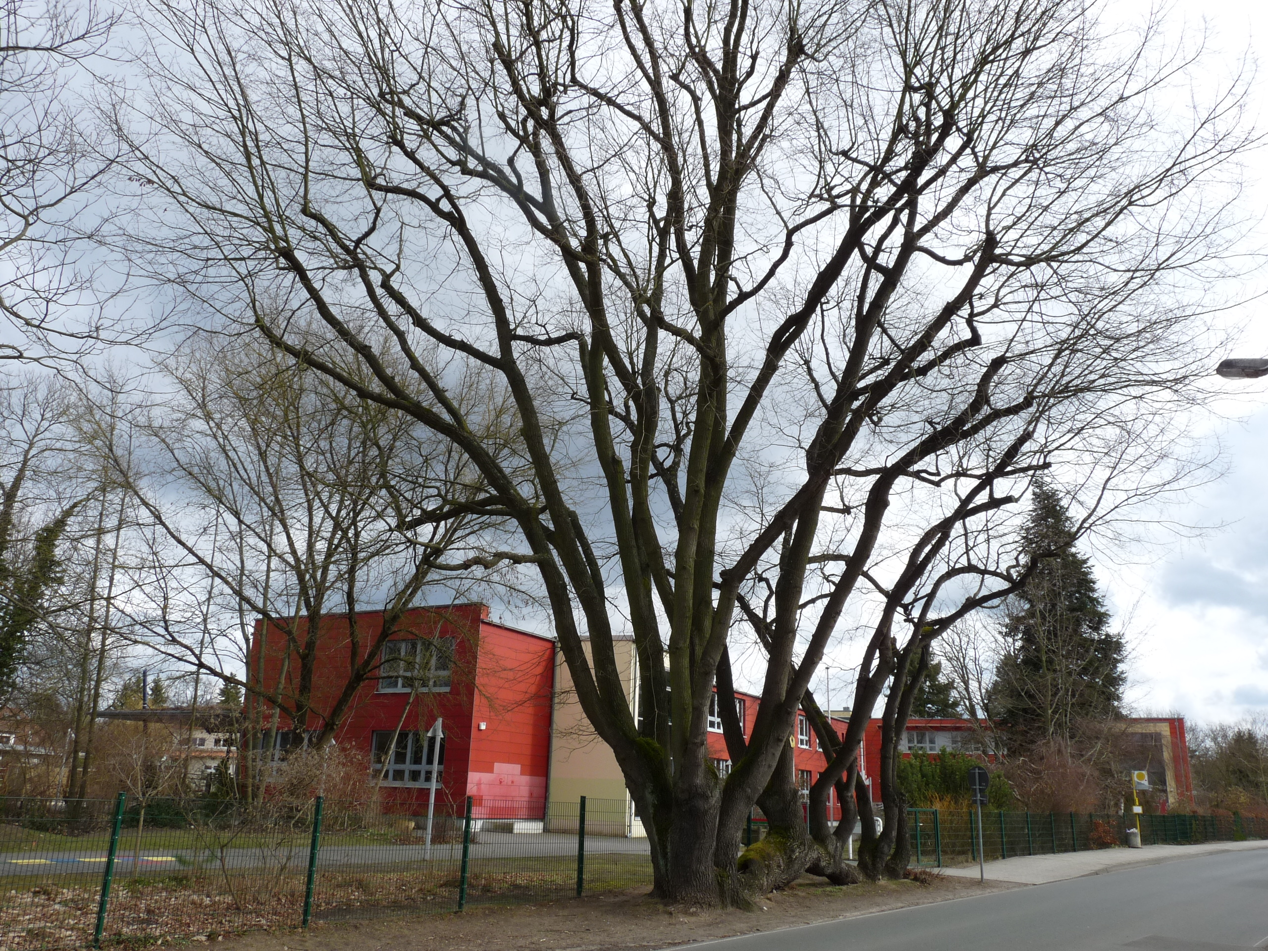 Stiel-Eiche (Quercus robur). Kronendurchmesser 27 m, Werder, Kemnitzer Chaussee vor Allgemeiner Förderschule Peter Joseph Lenné, auf Bürgersteig